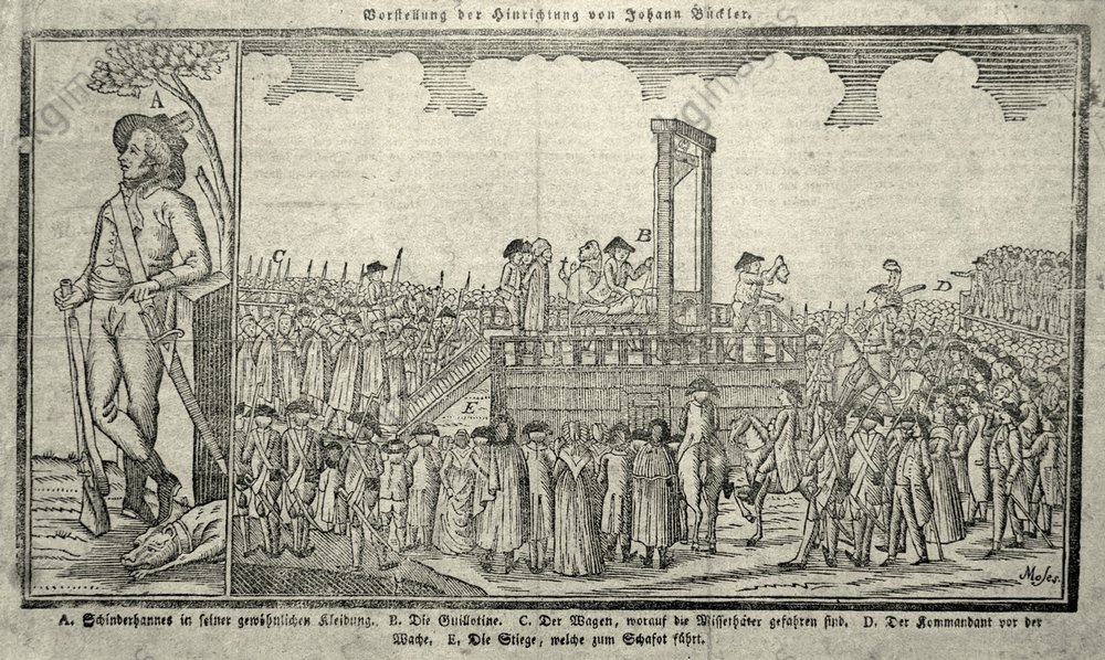 Zeitgenössischer Holzstich von der Hinrichtung Johann Böcklers, genannt Schinderhannes